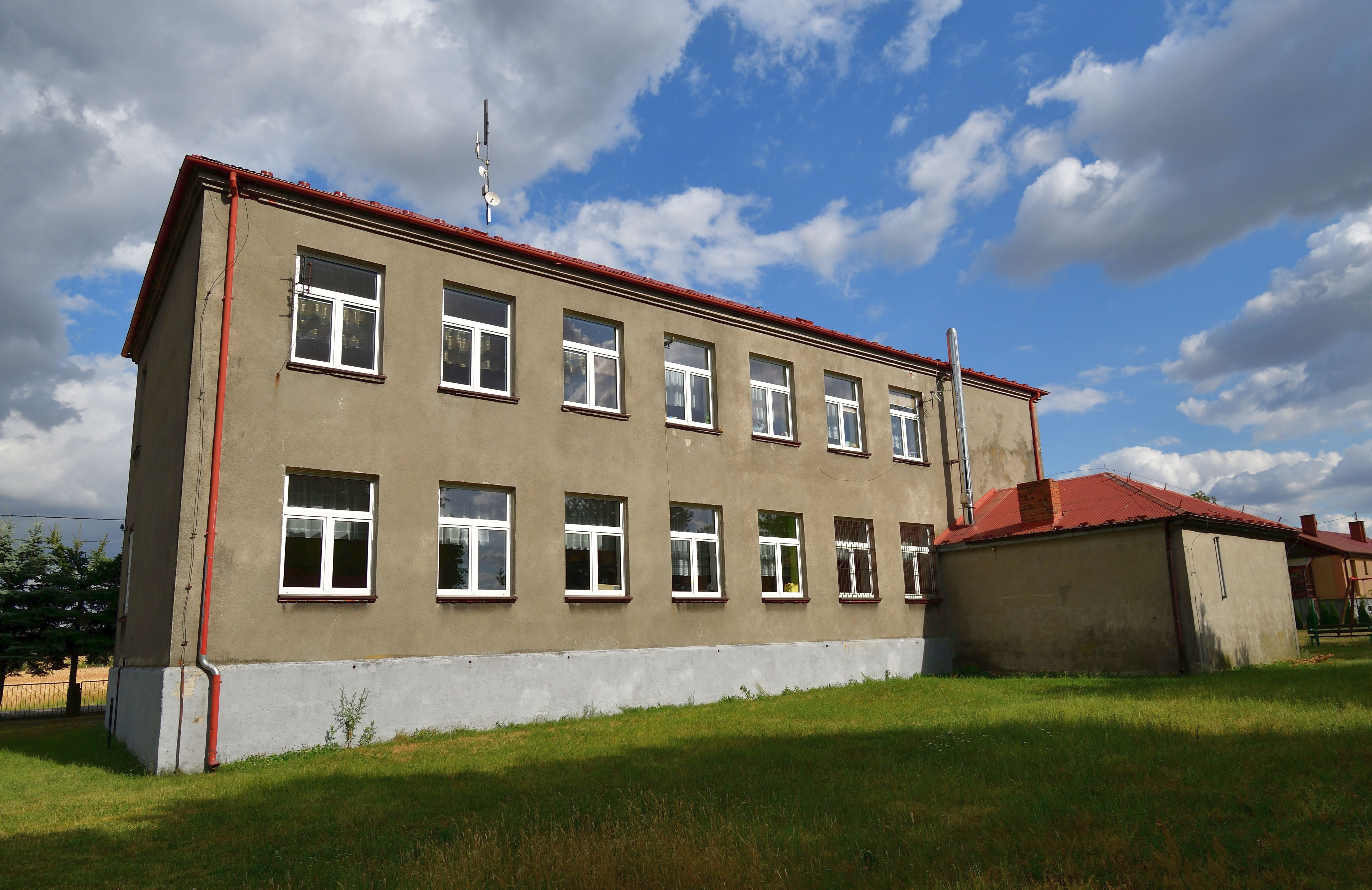 Chróścin szkoła 2019